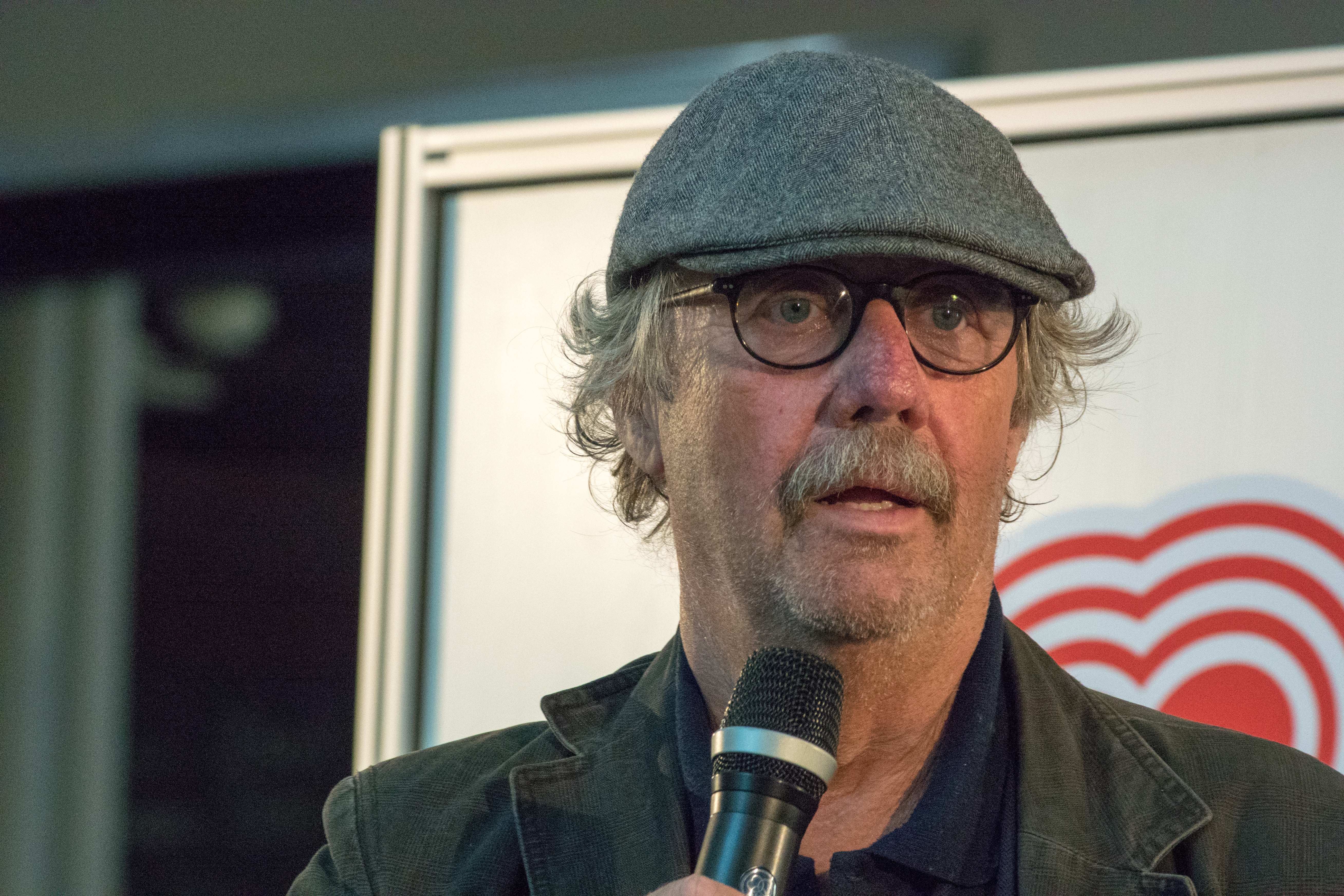 Kari Salmelainen